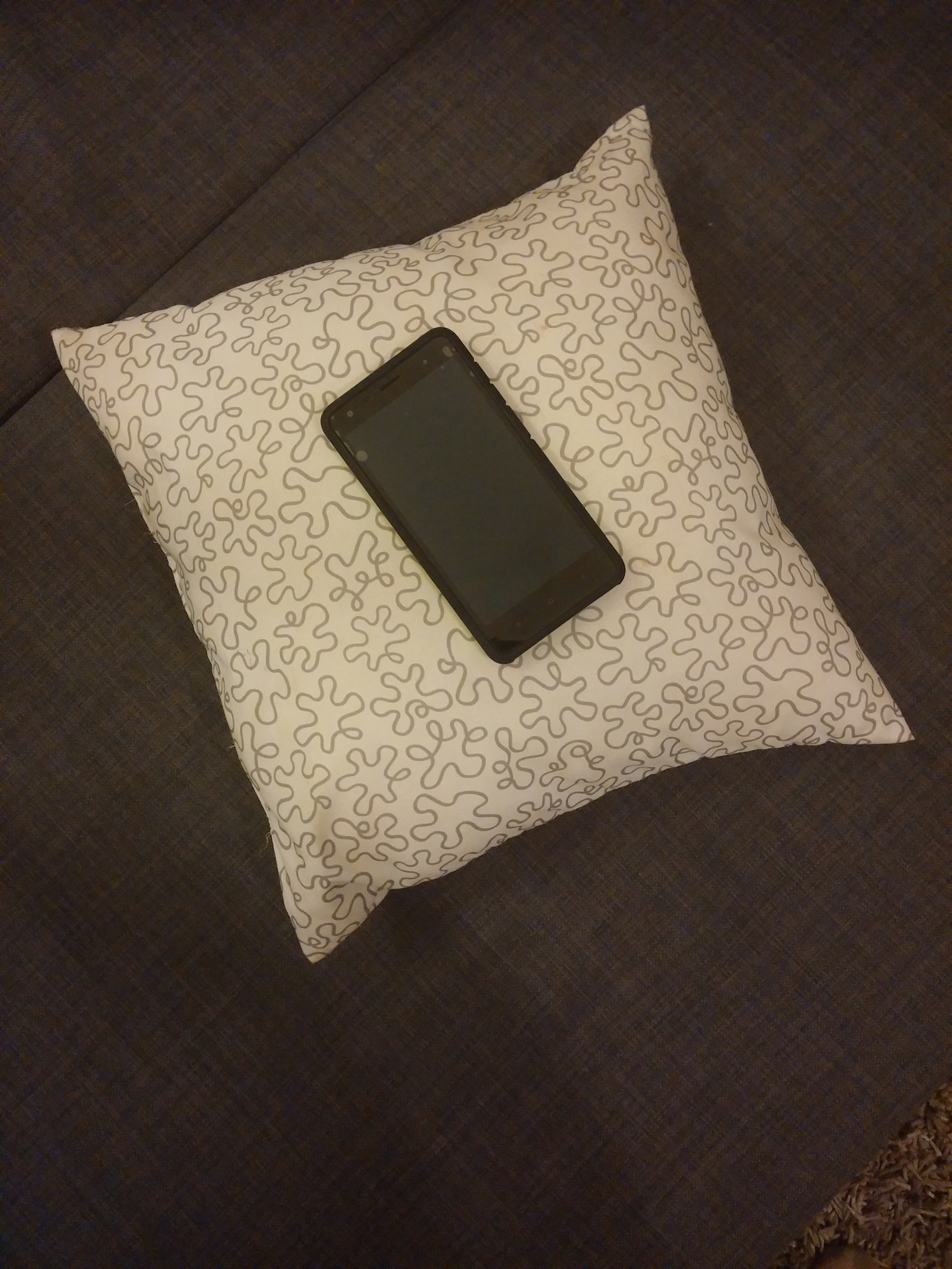 המחשת העקרון "בסיס לדבר האסור"